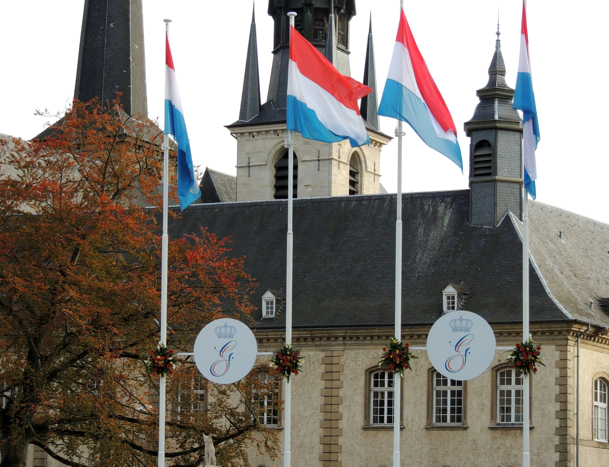 Um Dag vum zivle Bestietnes vum Ierfgroussherzog Guillaume mat der Stéphanie vu Lëtzebuerg ass de Knuedler och mat hirem double Monogramm gerëscht.